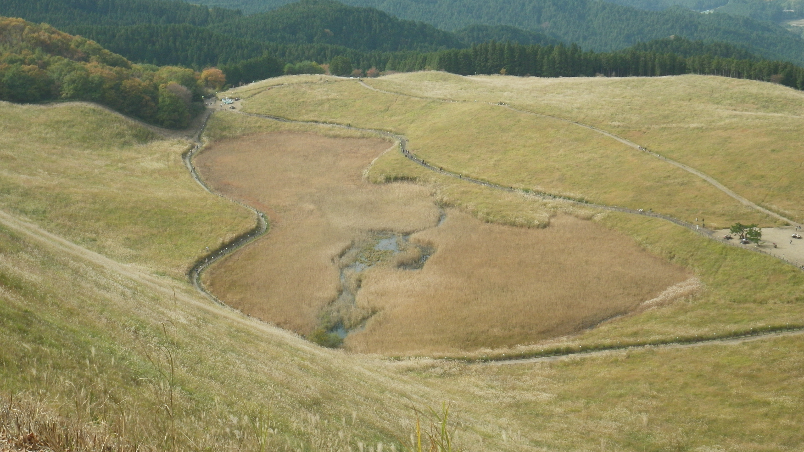 曽爾高原のお亀池